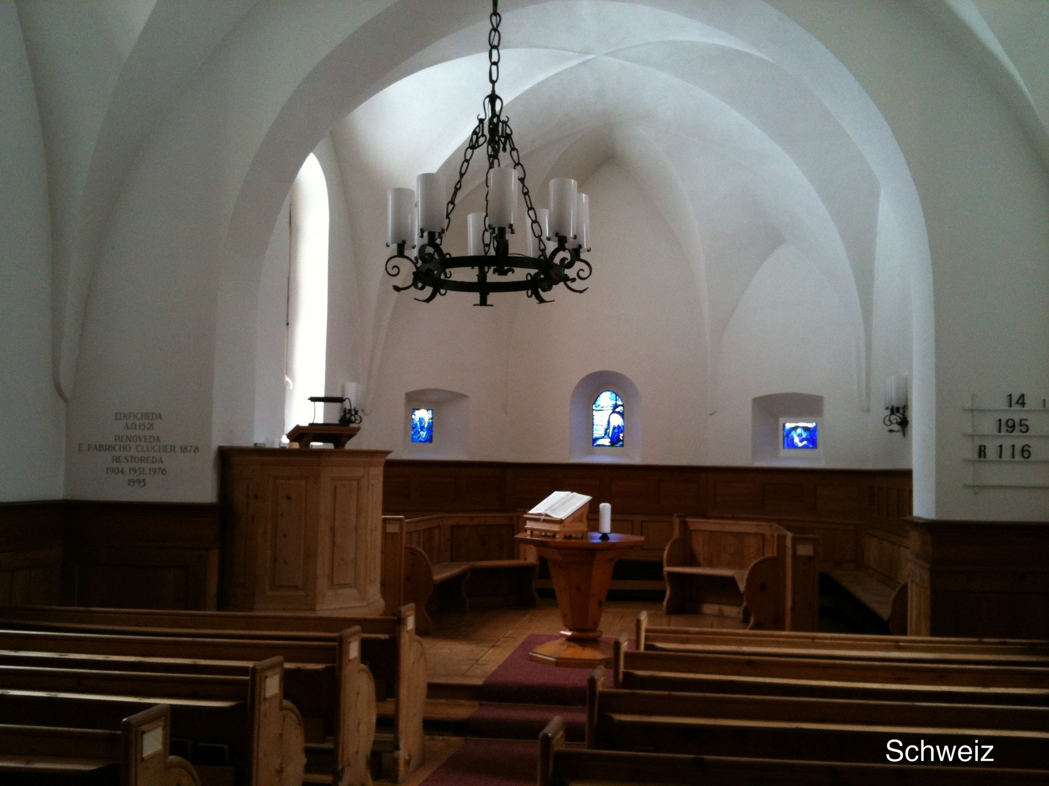 reformierte Kirche Champfèr, Kanton Graubünden